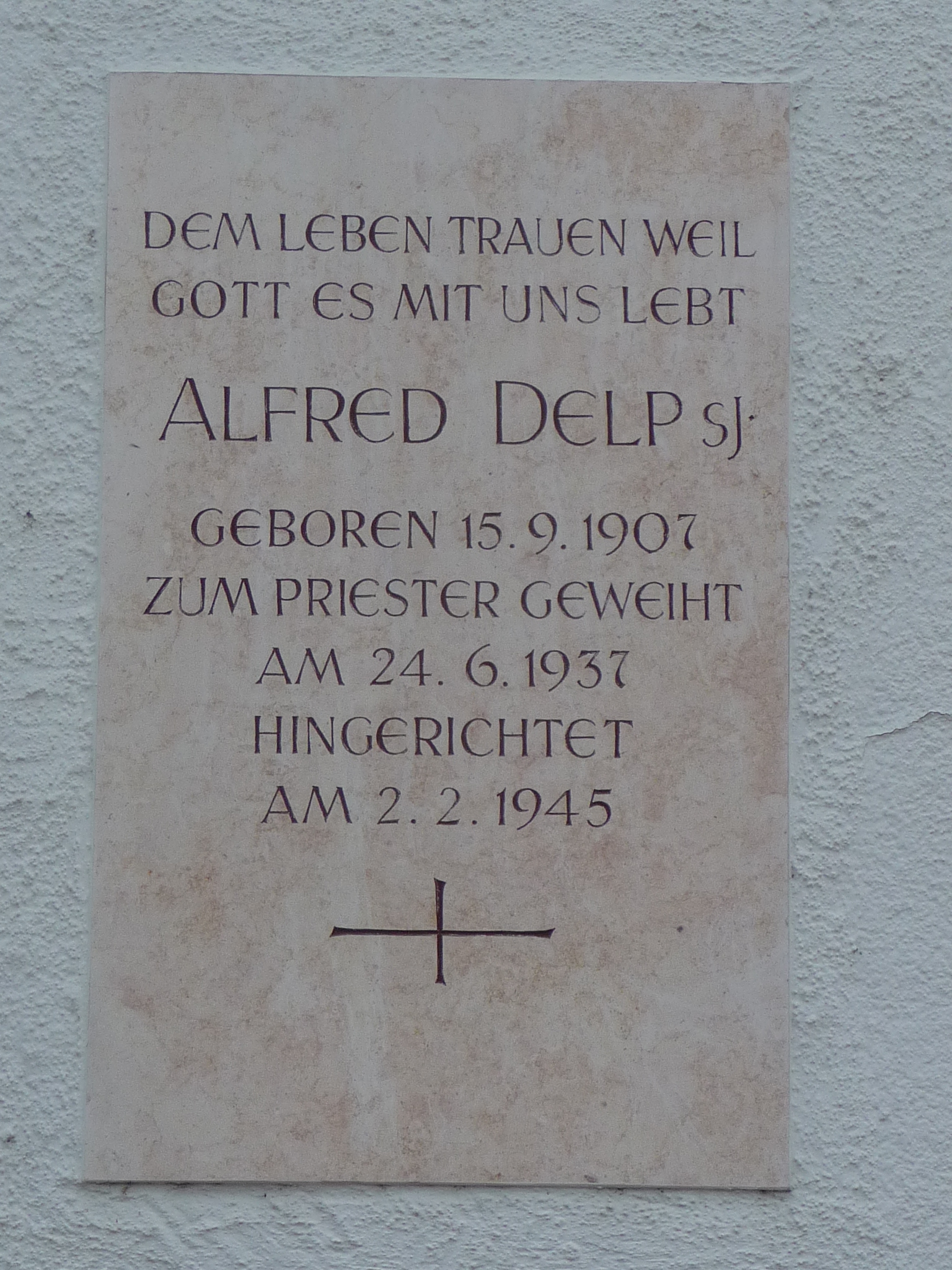 Lampertheim